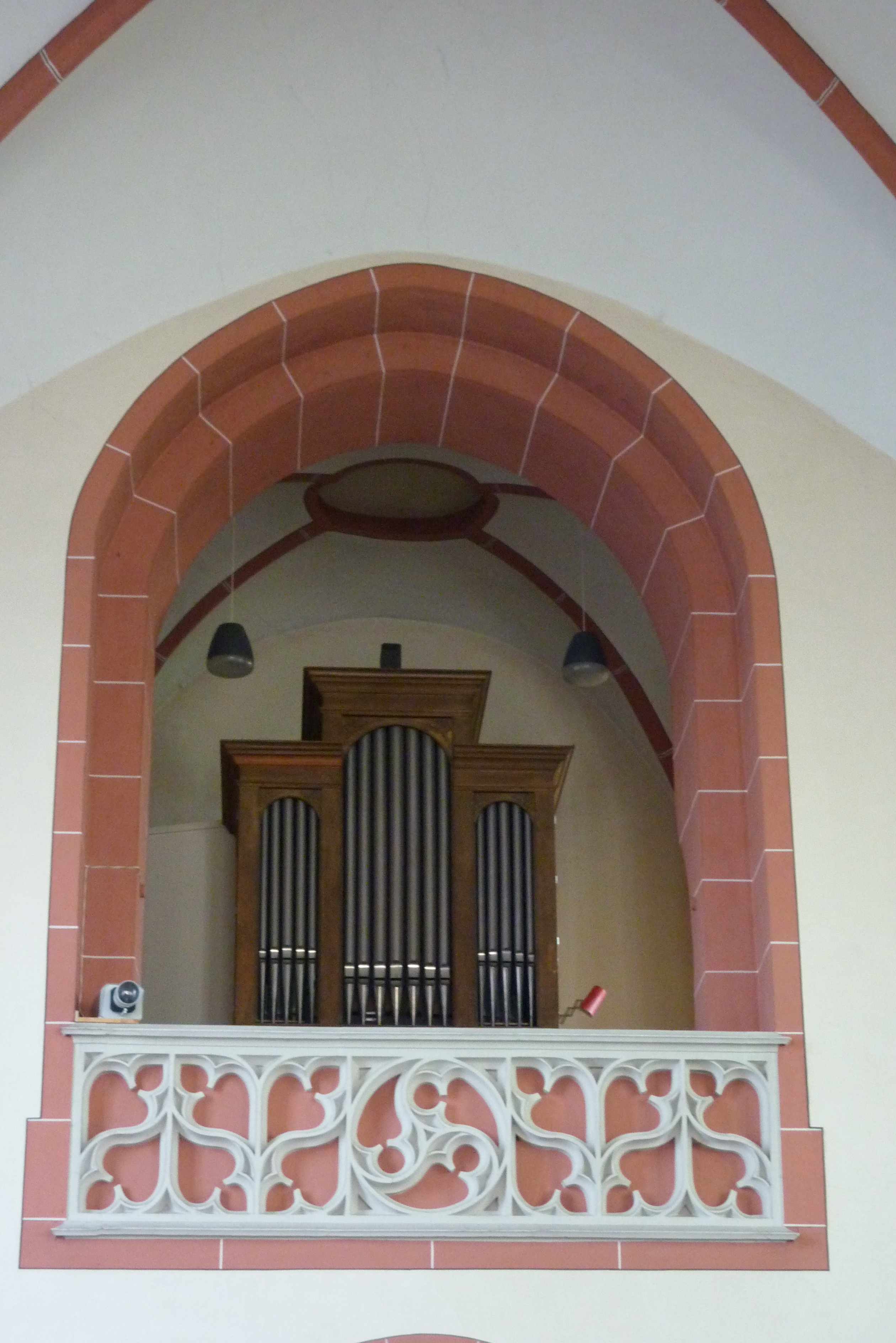 katholische Pfarrkirche St. Johann Baptist in Niederber], Orgel